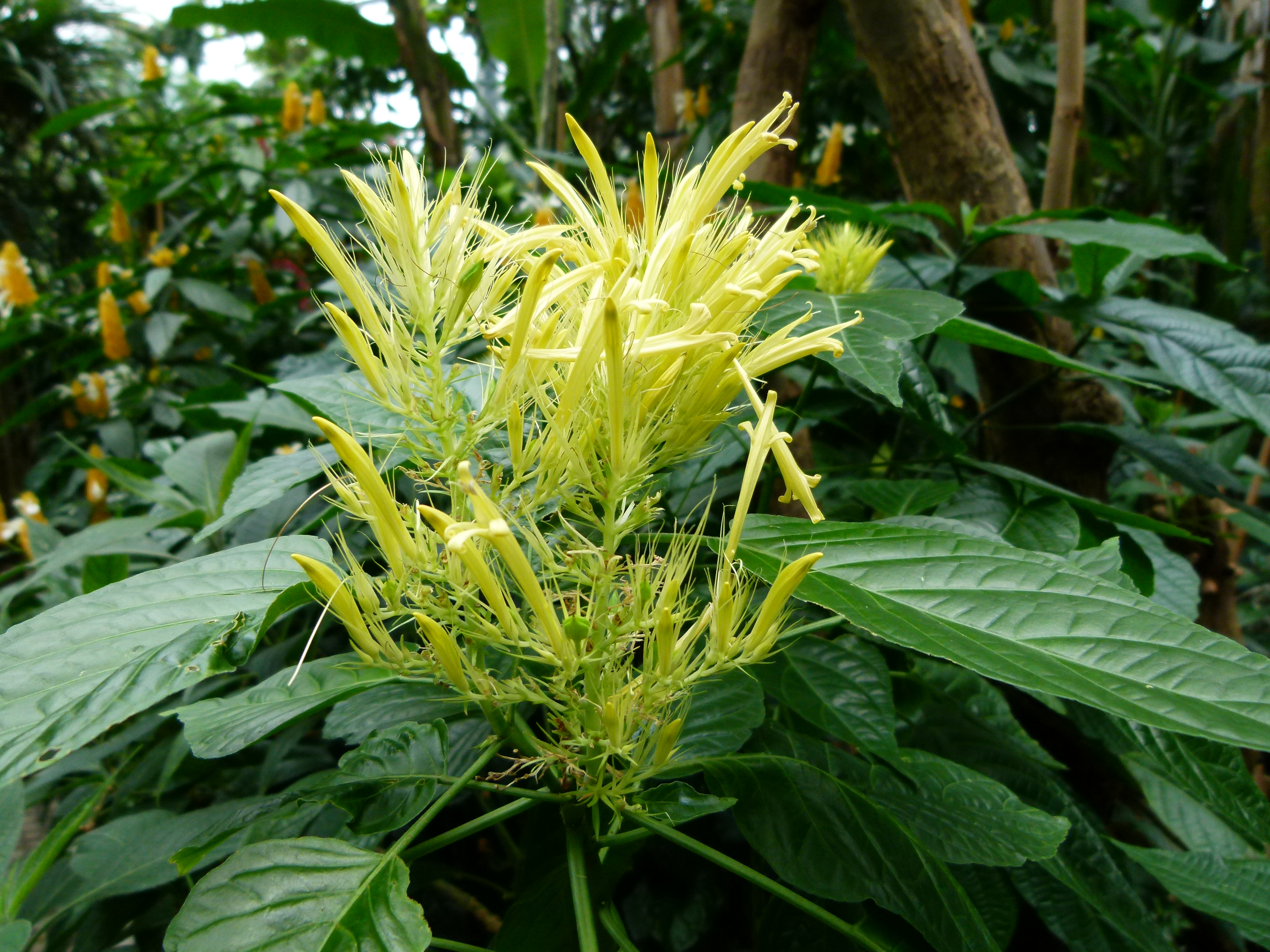 Photos taken summer 2011 in the greenhouse of the park Planten un Blomen in Hamburg. This park used to be the botanical garden of the city. Fotos sind von Sommer 2011 in dem Gewächshaus von dem Park Planten un Blomen von Hamburg genommen worden. Dieser Park war früher der botanische Garten. Photos prises l'été 2011 dans les serres du Parc Planten un Blomen de Hambourg. Ce parc était autrefois le jardin botanique de la ville.